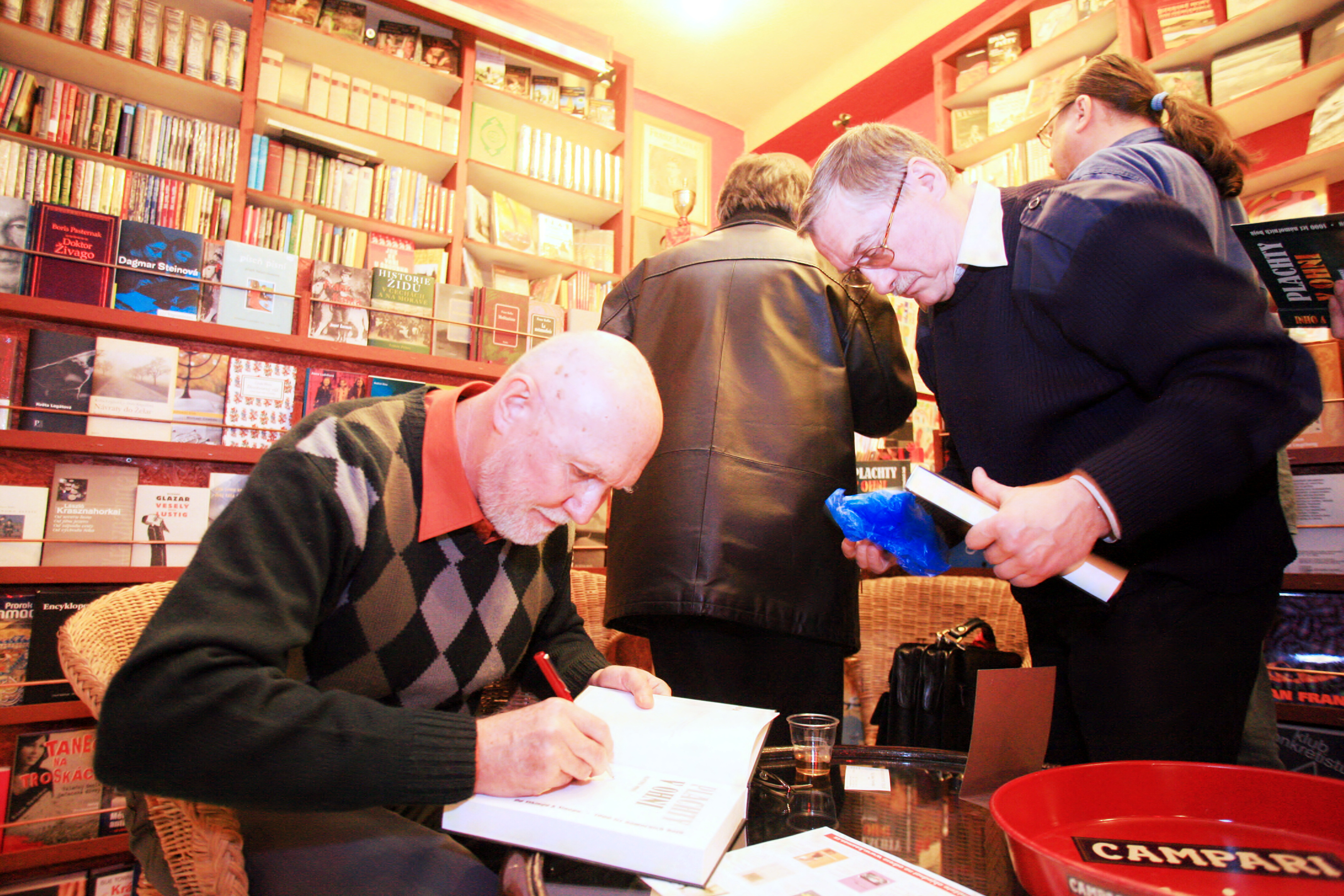 Při podepisování knížky „Plachty v ohni“, v níž spisovatel zúročil svůj celoživotní zájem o námořní historii a válečné plachetnice.